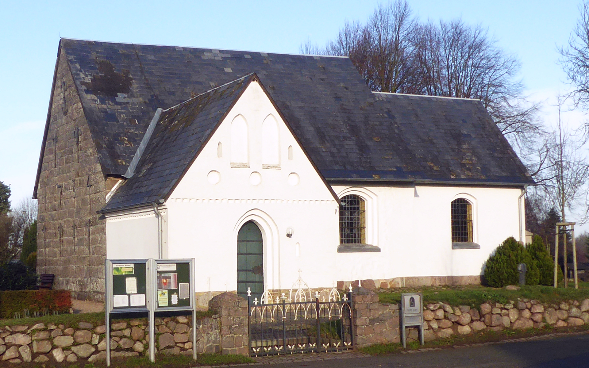 Nübel Feldsteinkirche 12-18. Jh mit Natursteinquaderverblendung - Foto 2018 Wolfgang Pehlemann P1280517